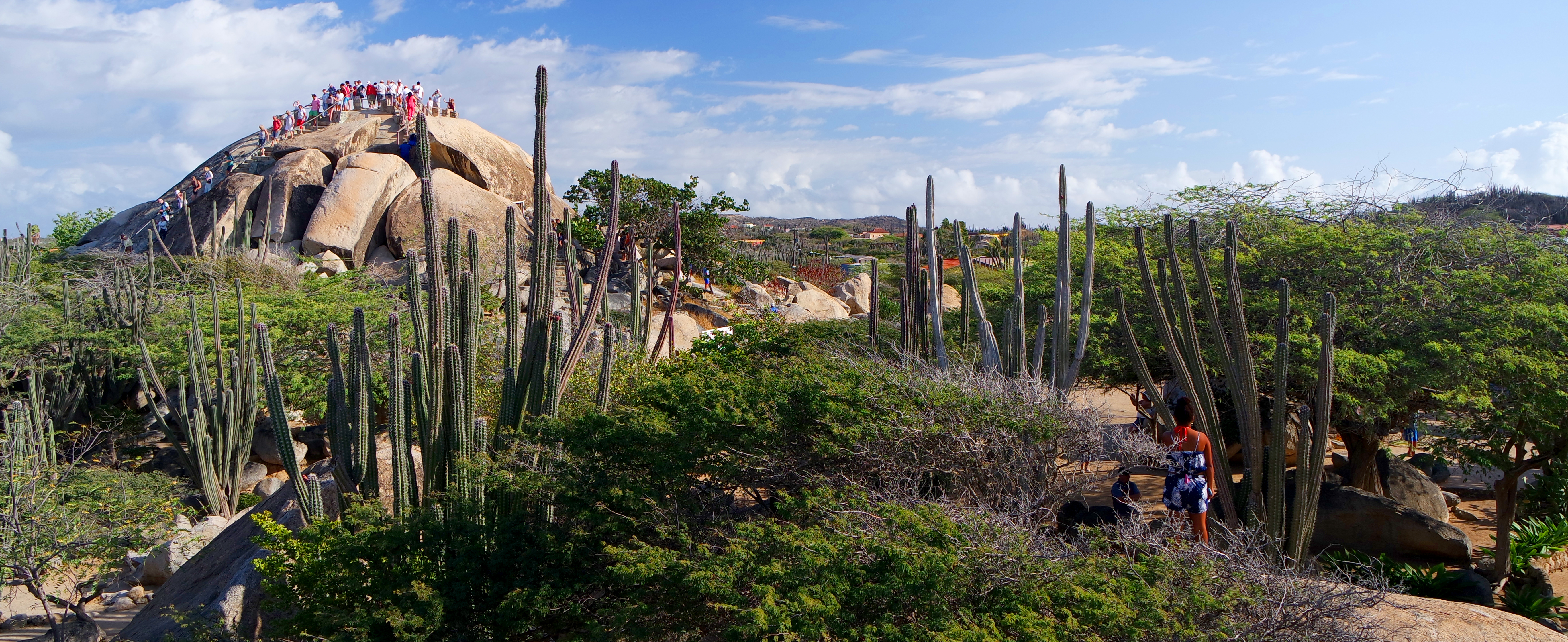 Landesinnere von Aruba